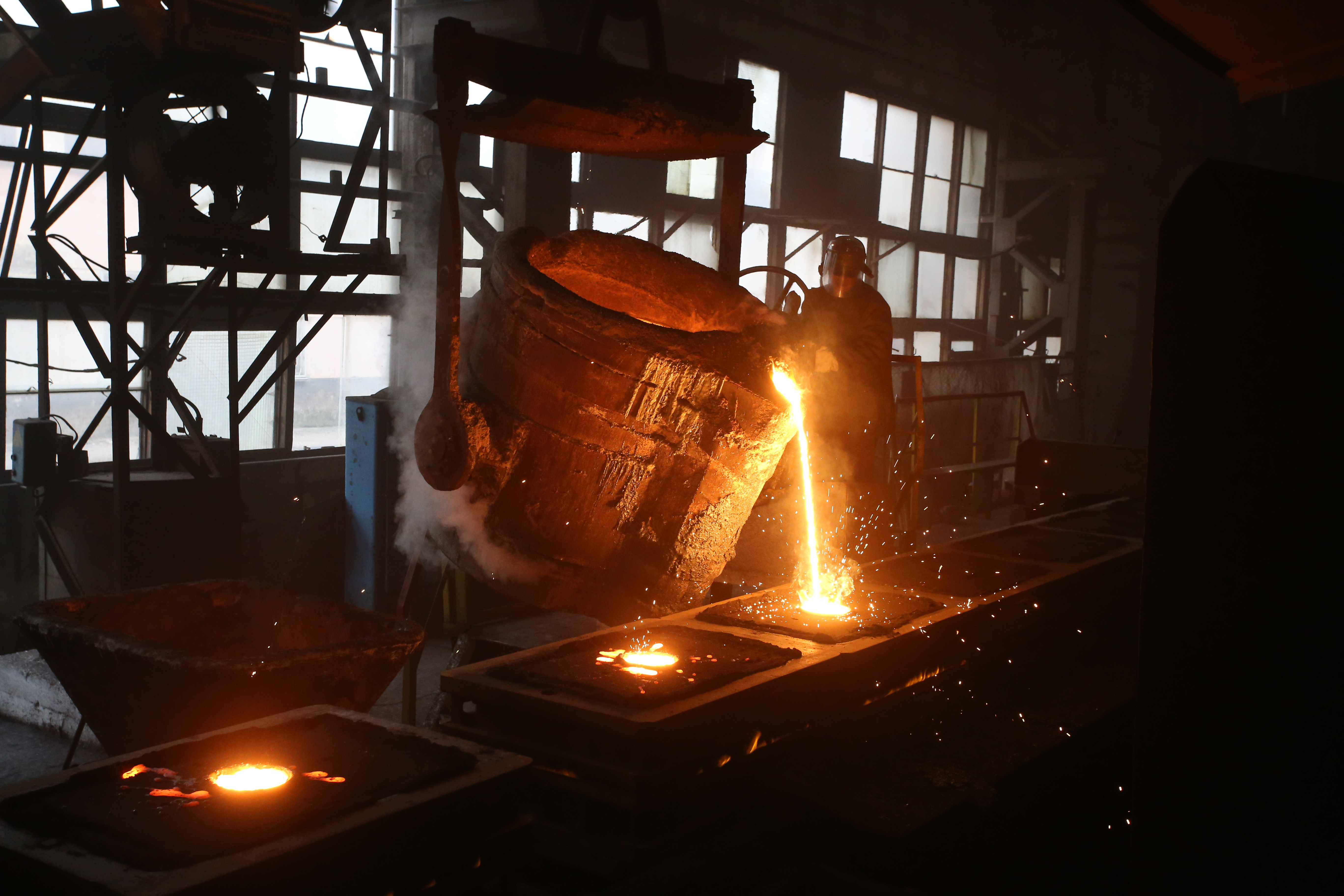 КМЗ цех литейный